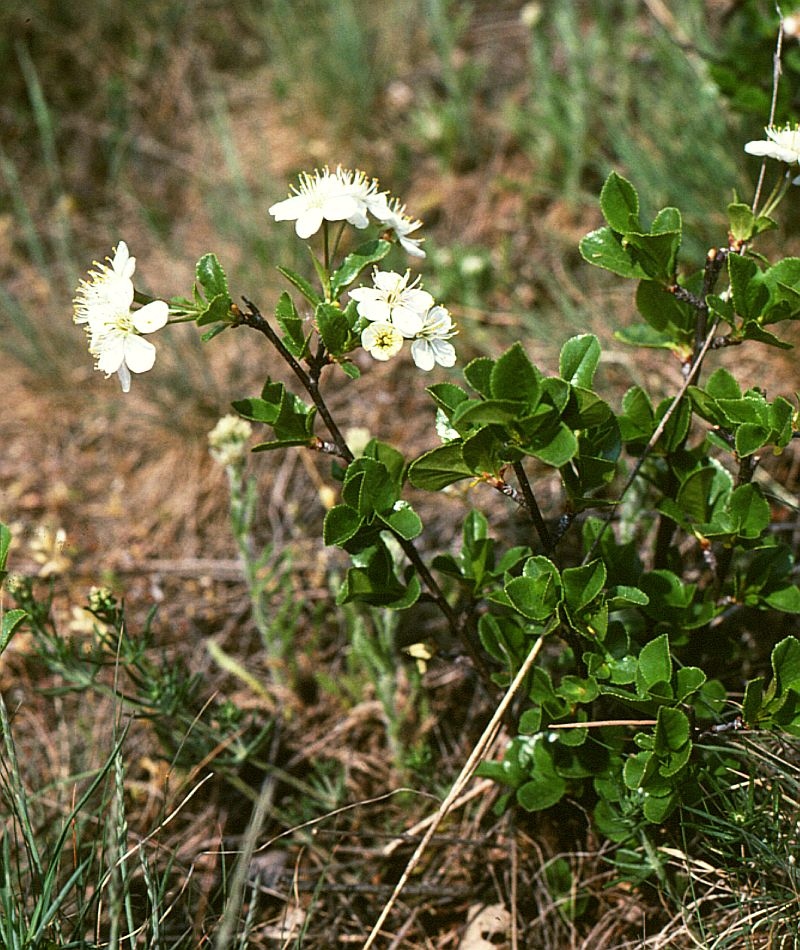 Zwerg-Weichsel (Prunus fruticosa), Rosengewächse (Rosaceae) - Österreich/Austria/Autriche: Niederösterreich, Ostrand des Waldviertels, „Kogelstein“ NNE Grafenberg bei Eggenburg